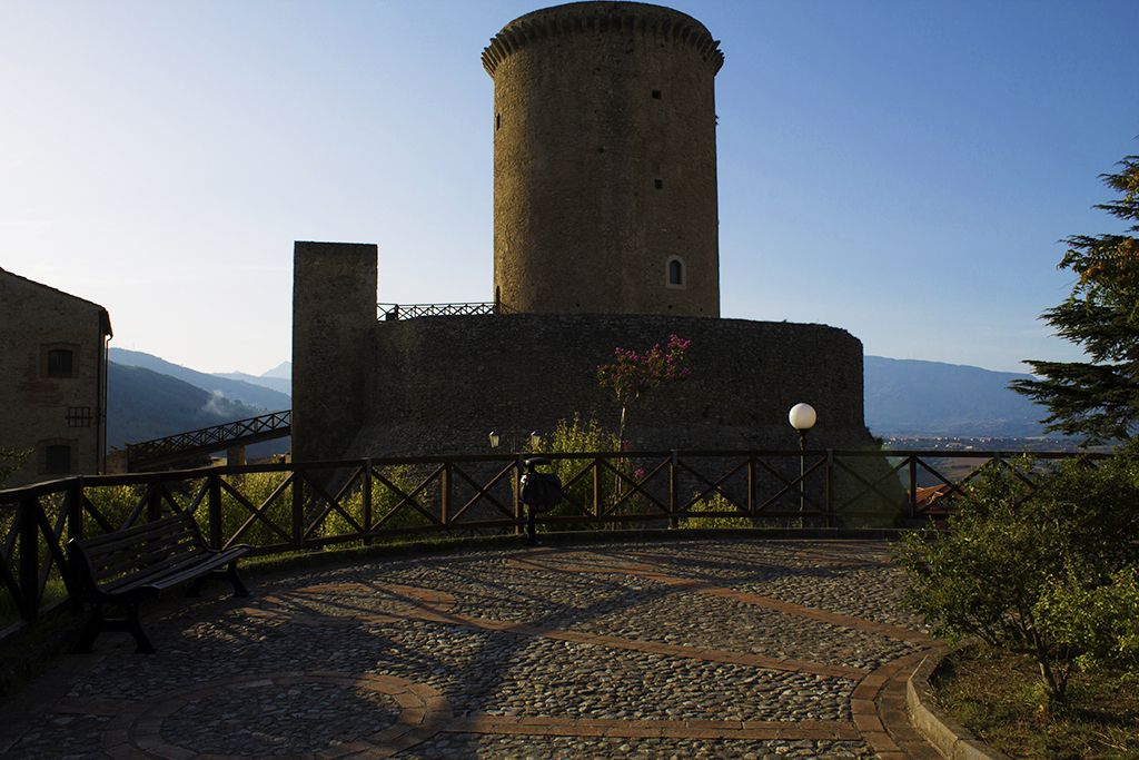 Torre This is a photo of a monument which is part of cultural heritage of Italy.